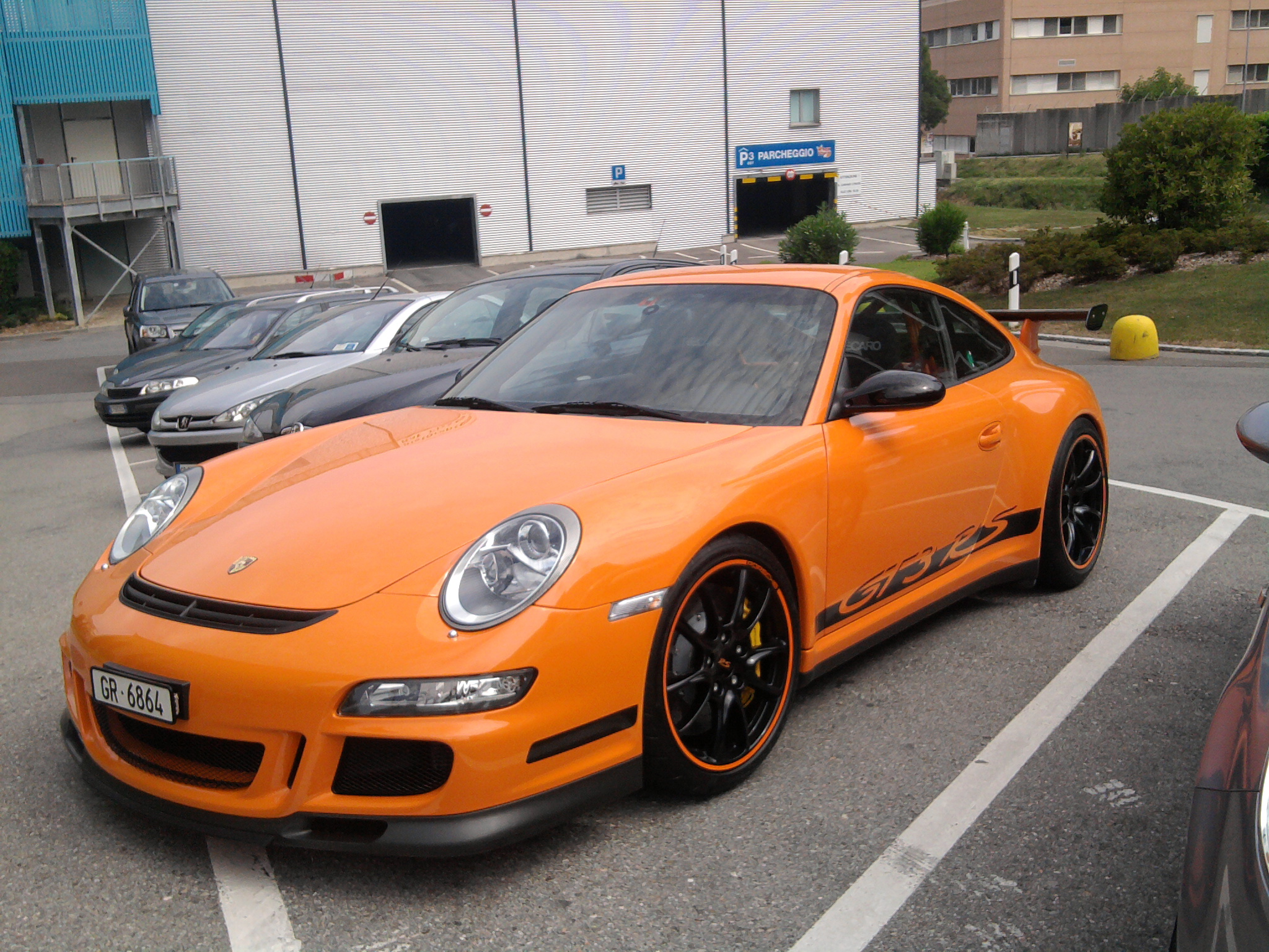 Porsche 997 GT3 RS